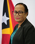 Regina Freitas, Abgeordnete des Nationalparlaments Osttimors